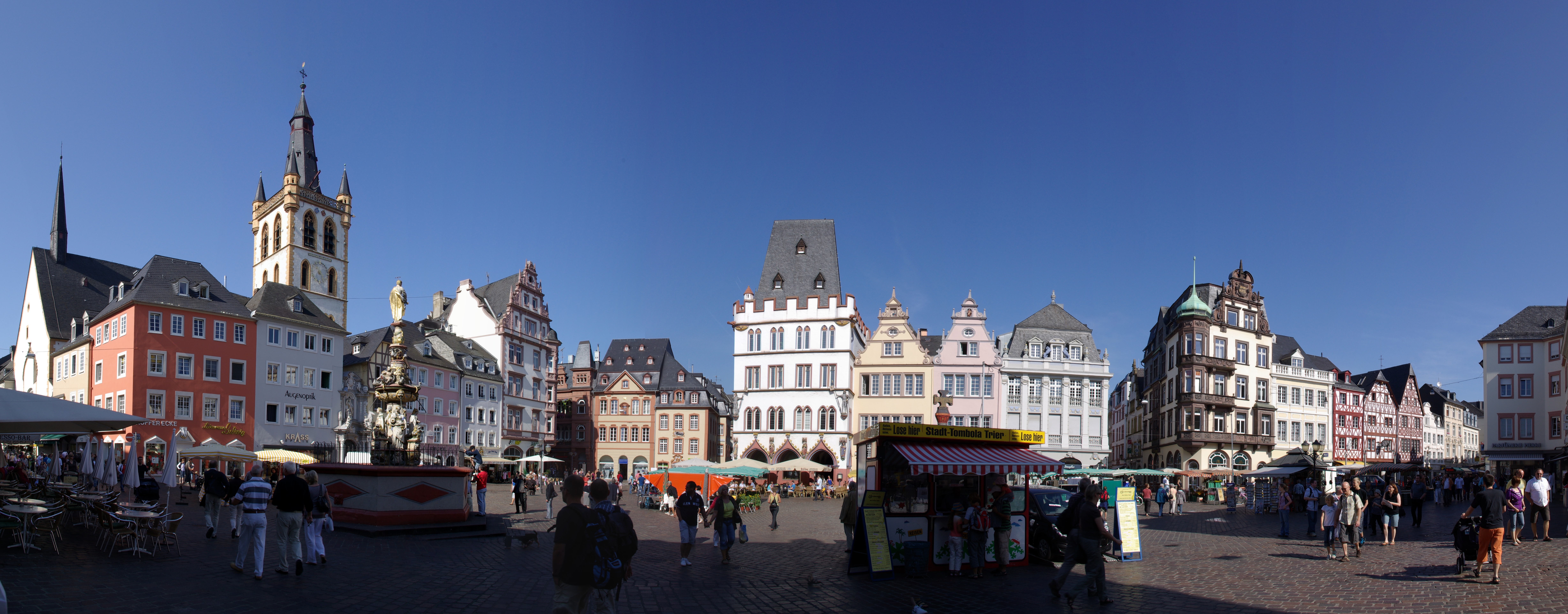 Denkmalzone Marktbezirk: umfasst den Bereich der mittelalterlichen Siedlung am Hauptmarkt: Umbauung des Hauptmarktes und der einmündenden Straßen und des Stockplatzes einschließlich der Markt- und Pfarrkirche St. Gangolph; dreieckiger Grundriss, im 10. Jahrhundert durch Erzbischof Heinrich I. angelegt, planmäßige Baufluchtänderungen vom späten 18. bis zum frühen 20 Jahrhundert, heutige Bebauung romanisch bis 20. Jahrhundert